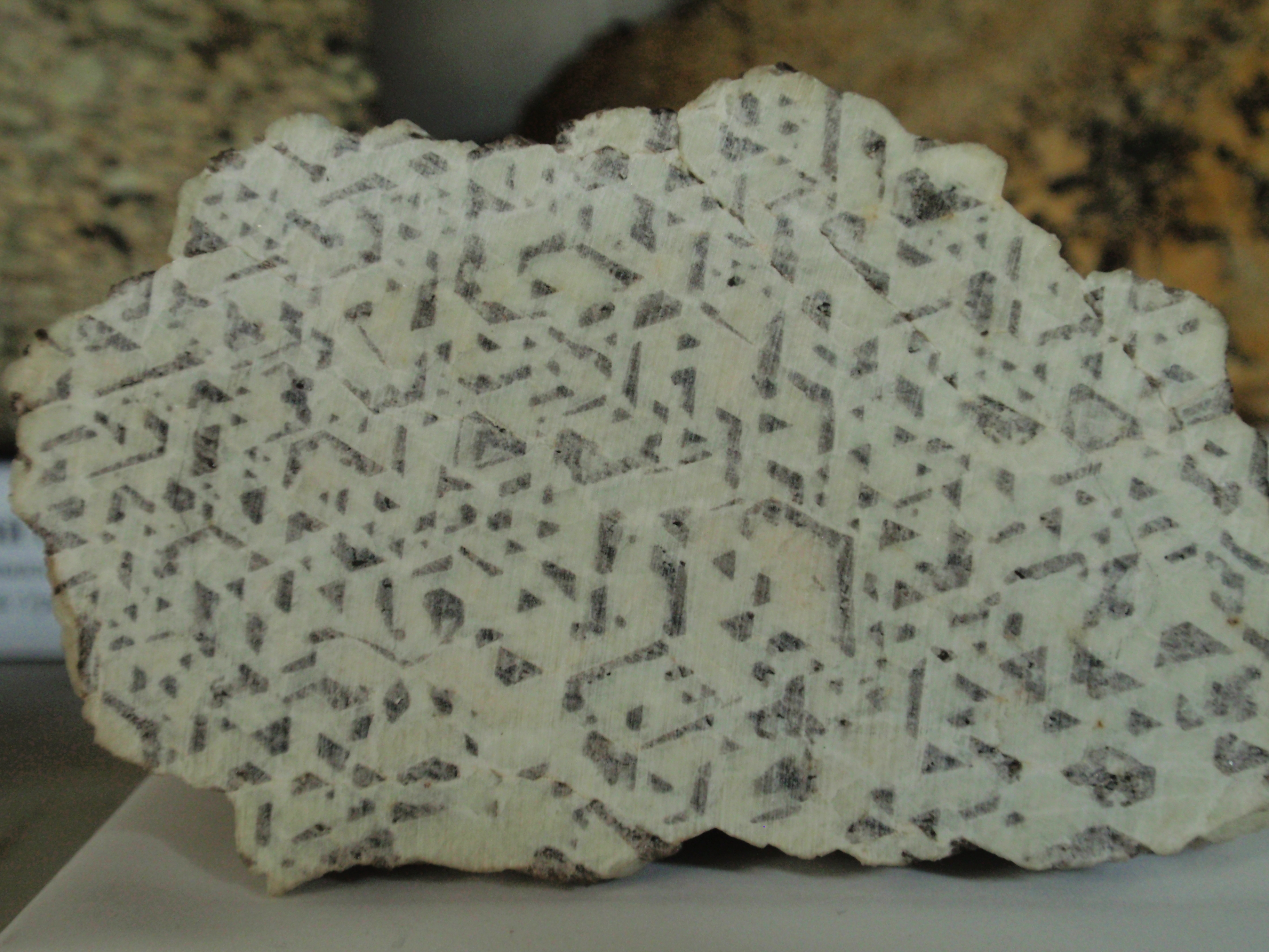 Графічний пегматит. Взірець пегматиту з графічної зони